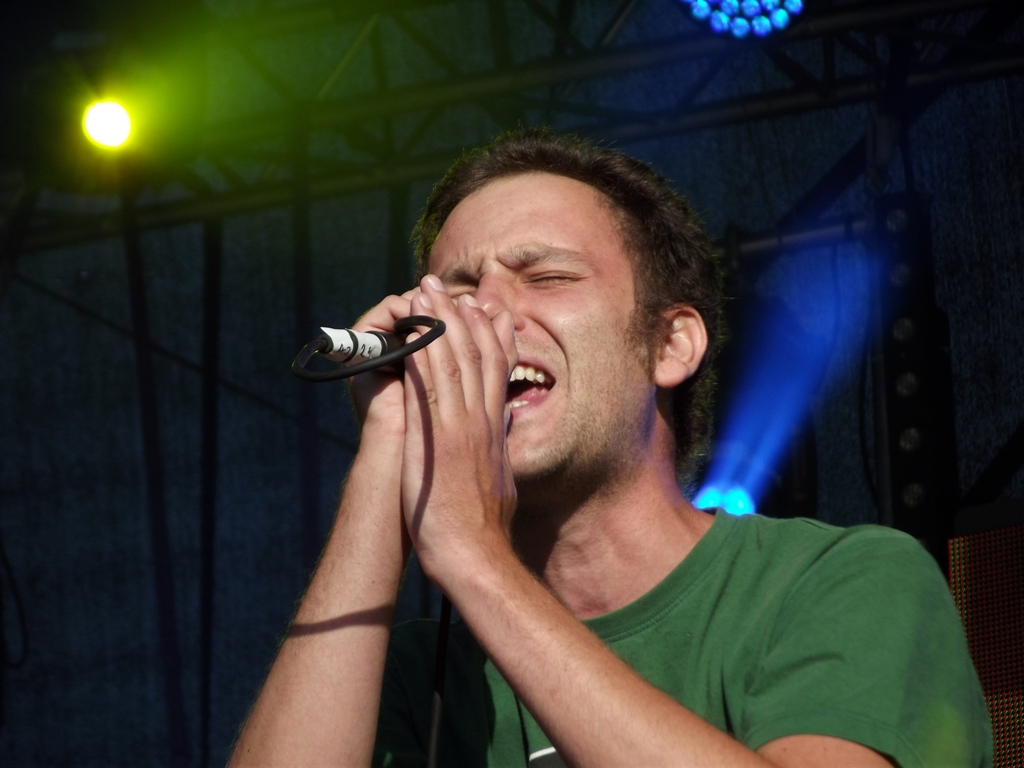 Zdjęcie zrobione podczas Festiwalu Energii, nad zalewem Sosina w Jaworznie.